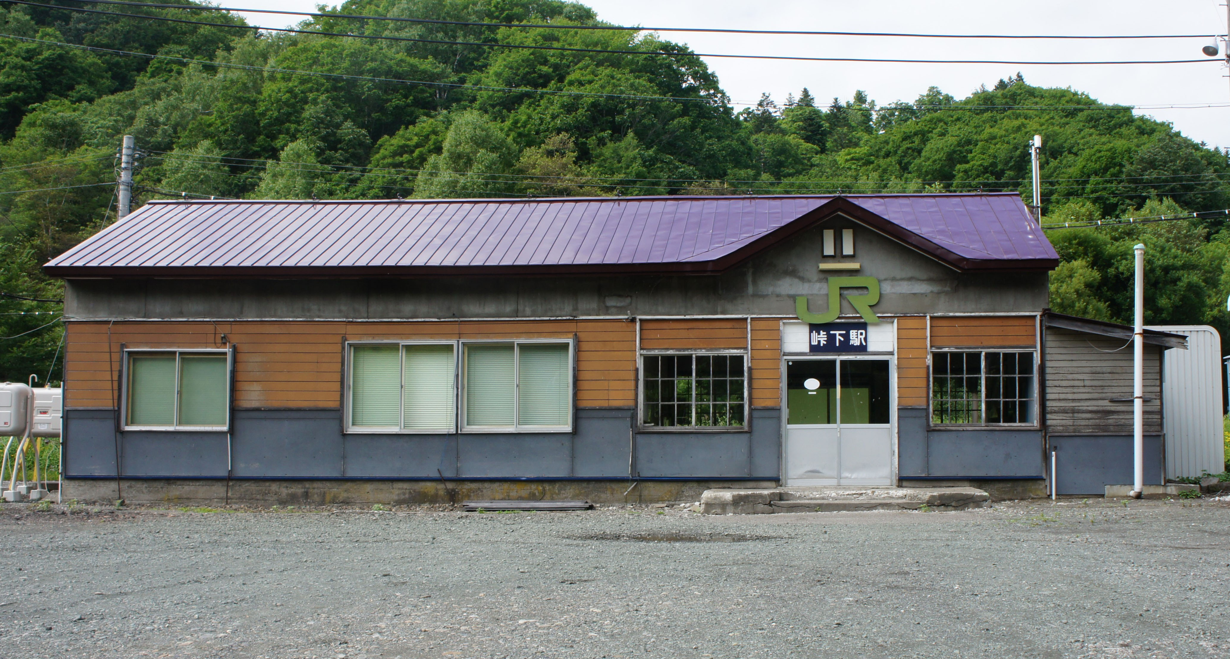 JR留萌本線・峠下駅の駅舎